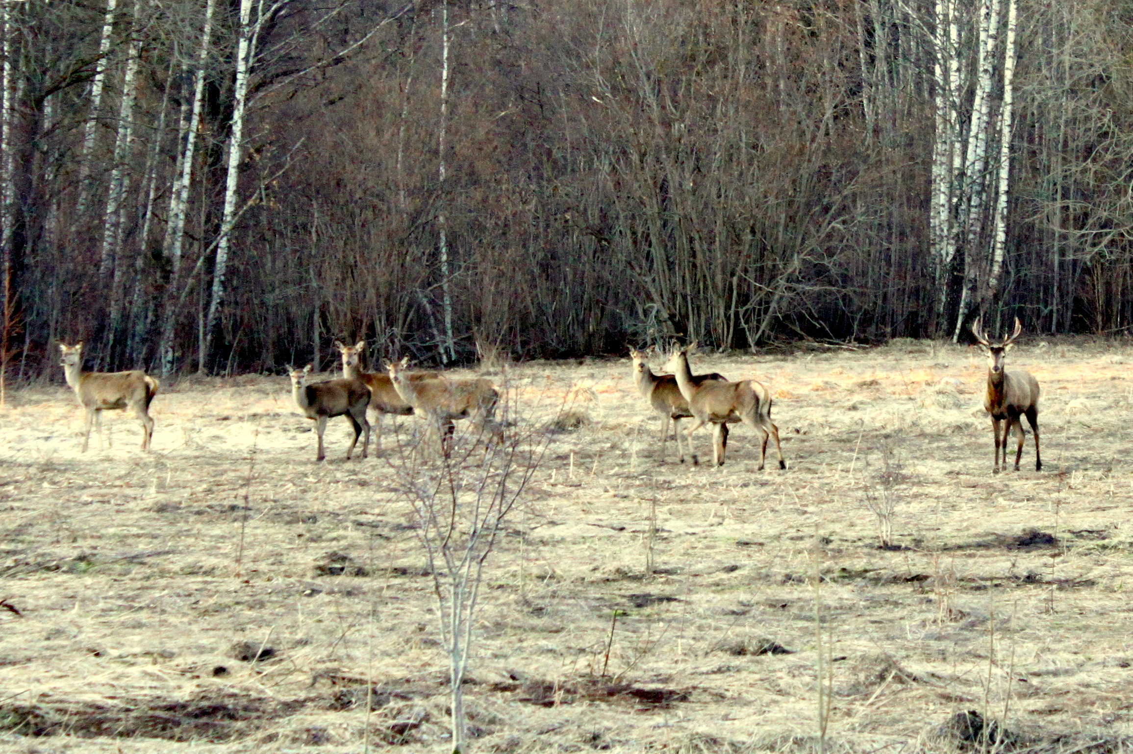 Asukoht: Roobaka, Leisi vald, Saaremaa